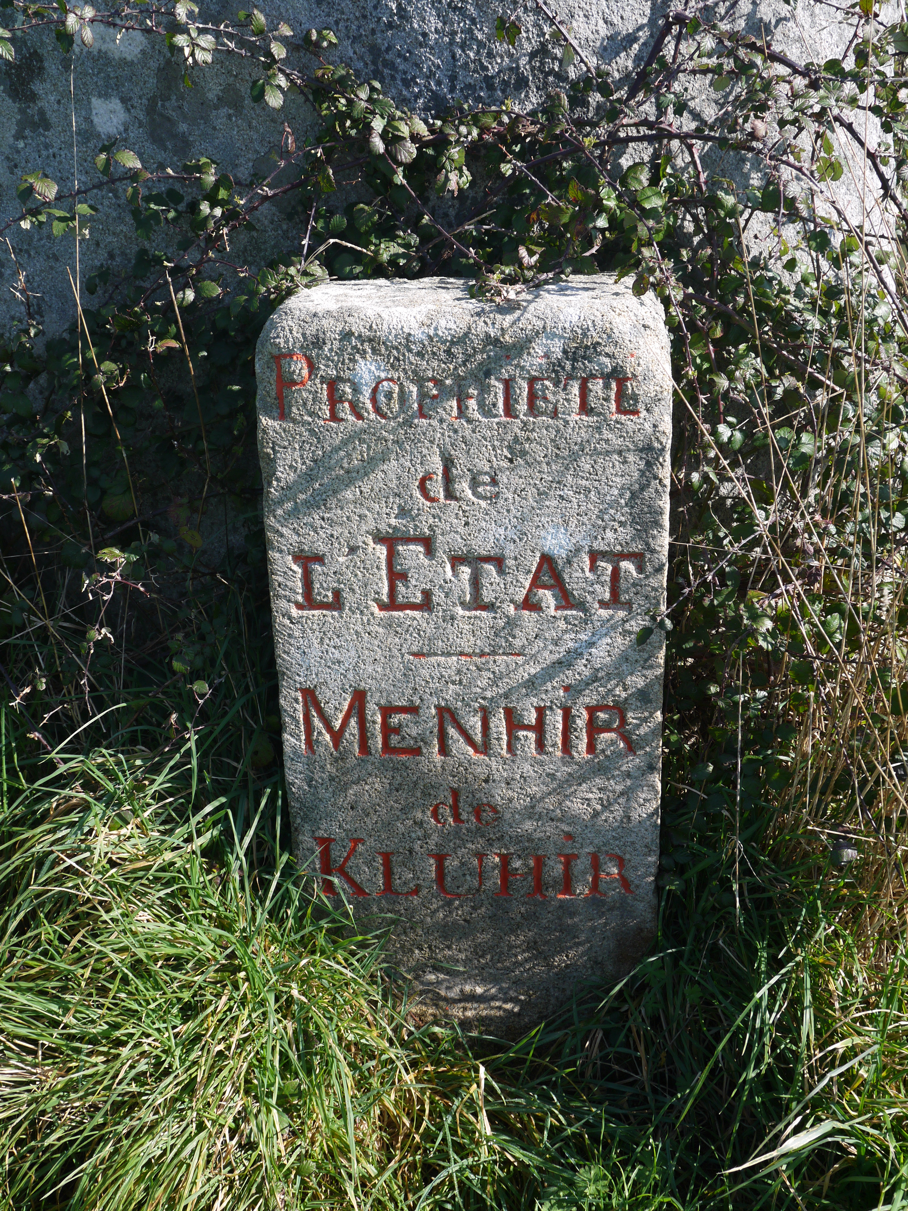 Stèle apposée au pied du menhir de Kerluhir center: Propriété de l’Etat - Menhir de Kluhir - in red